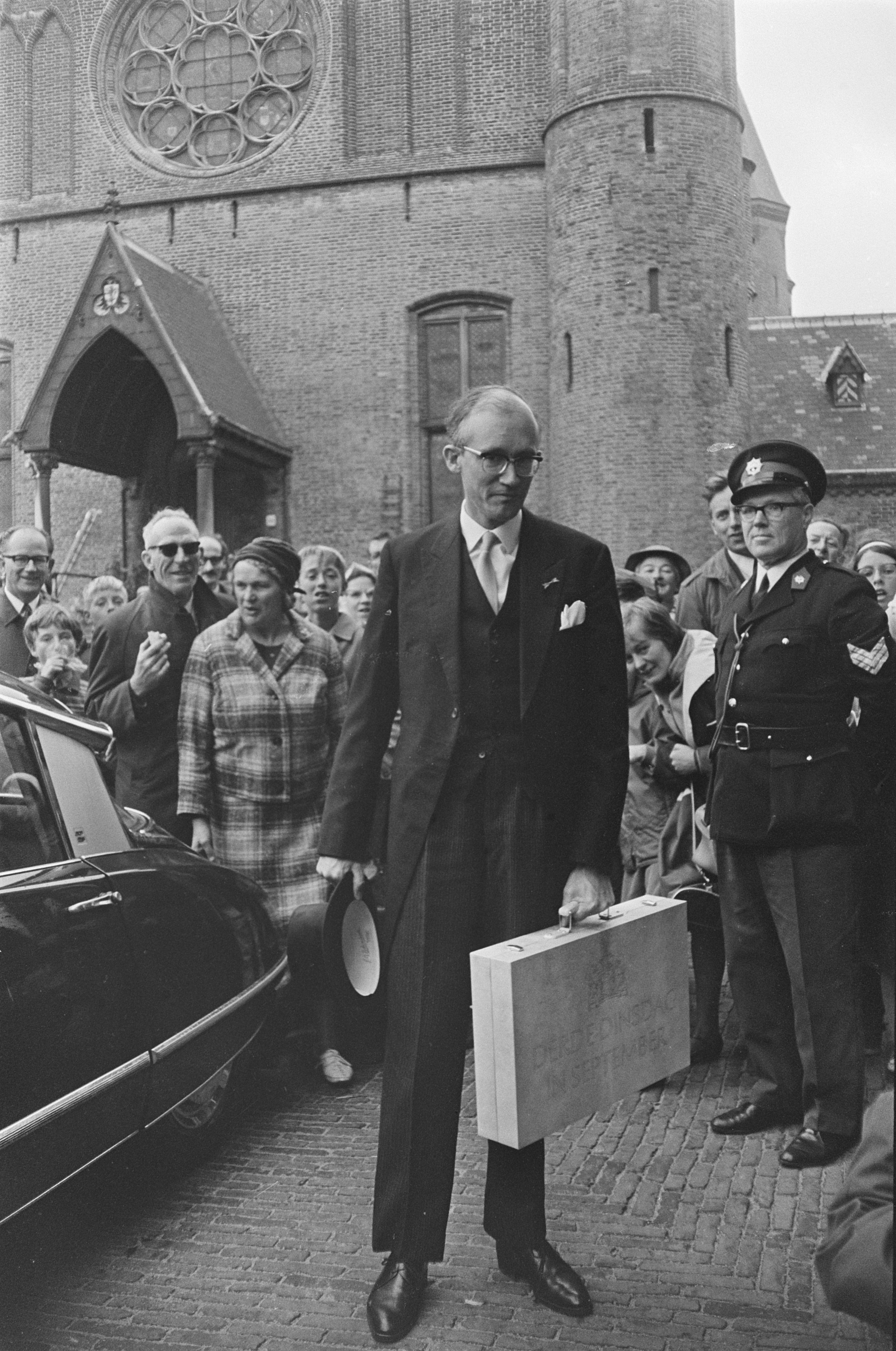 Collectie / Archief : Fotocollectie Anefo Reportage / Serie : Prinsjesdag 1967 Beschrijving : Aankomst van minister van Financiën Witteveen met de miljoenennota en het koffertje Datum : 19 september 1967 Locatie : Den Haag, Zuid-Holland Trefwoorden : ministers, overheidsbegrotingen Persoonsnaam : Witteveen, H.J. Fotograaf : Ben Merk / Anefo Auteursrechthebbende : Nationaal Archief Materiaalsoort : Negatief (zwart/wit) Nummer archiefinventaris : bekijk toegang 2.24.01.05 Bestanddeelnummer : 920-7211